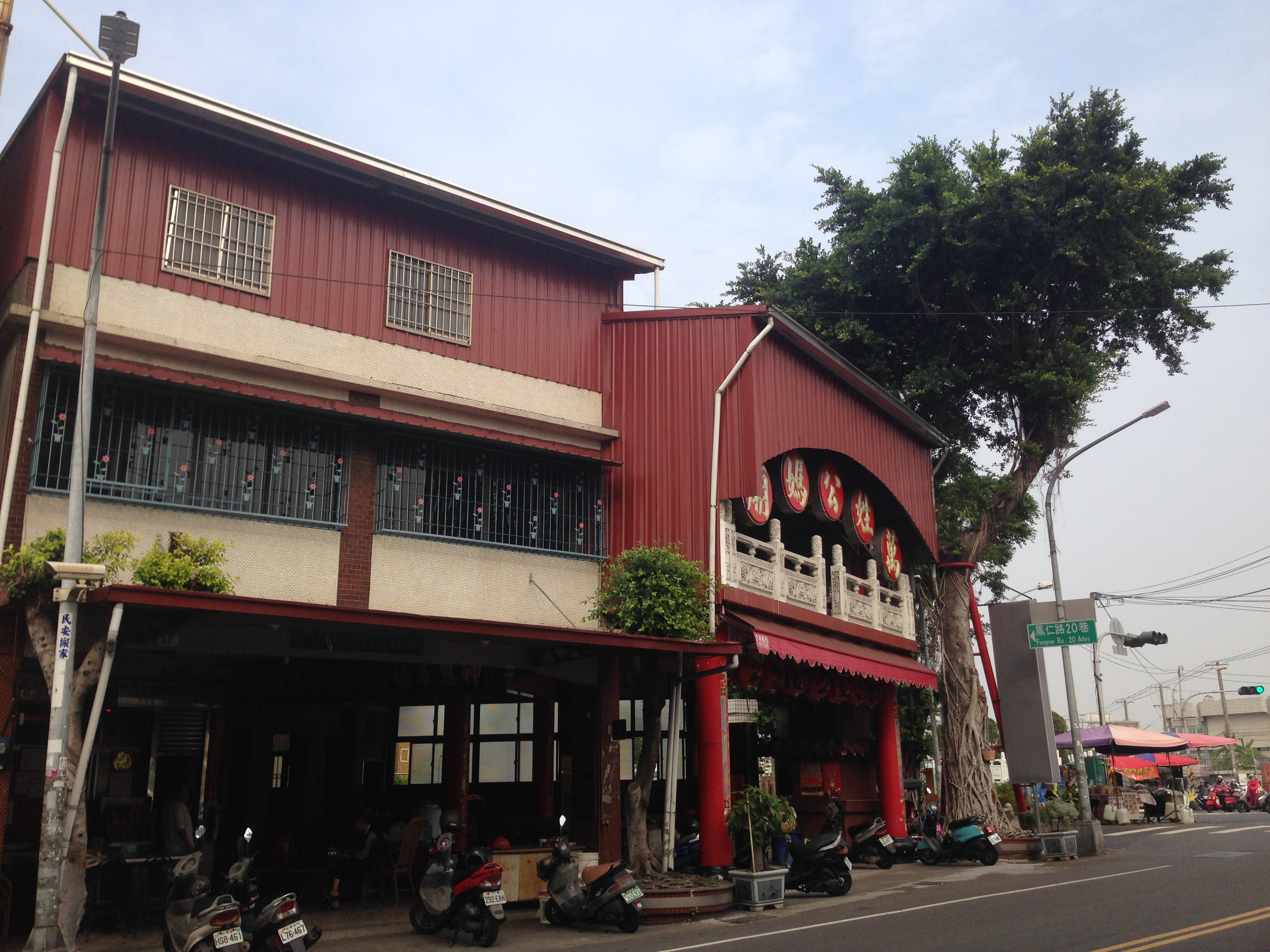 高雄市鳳山區北門萬姓公媽廟